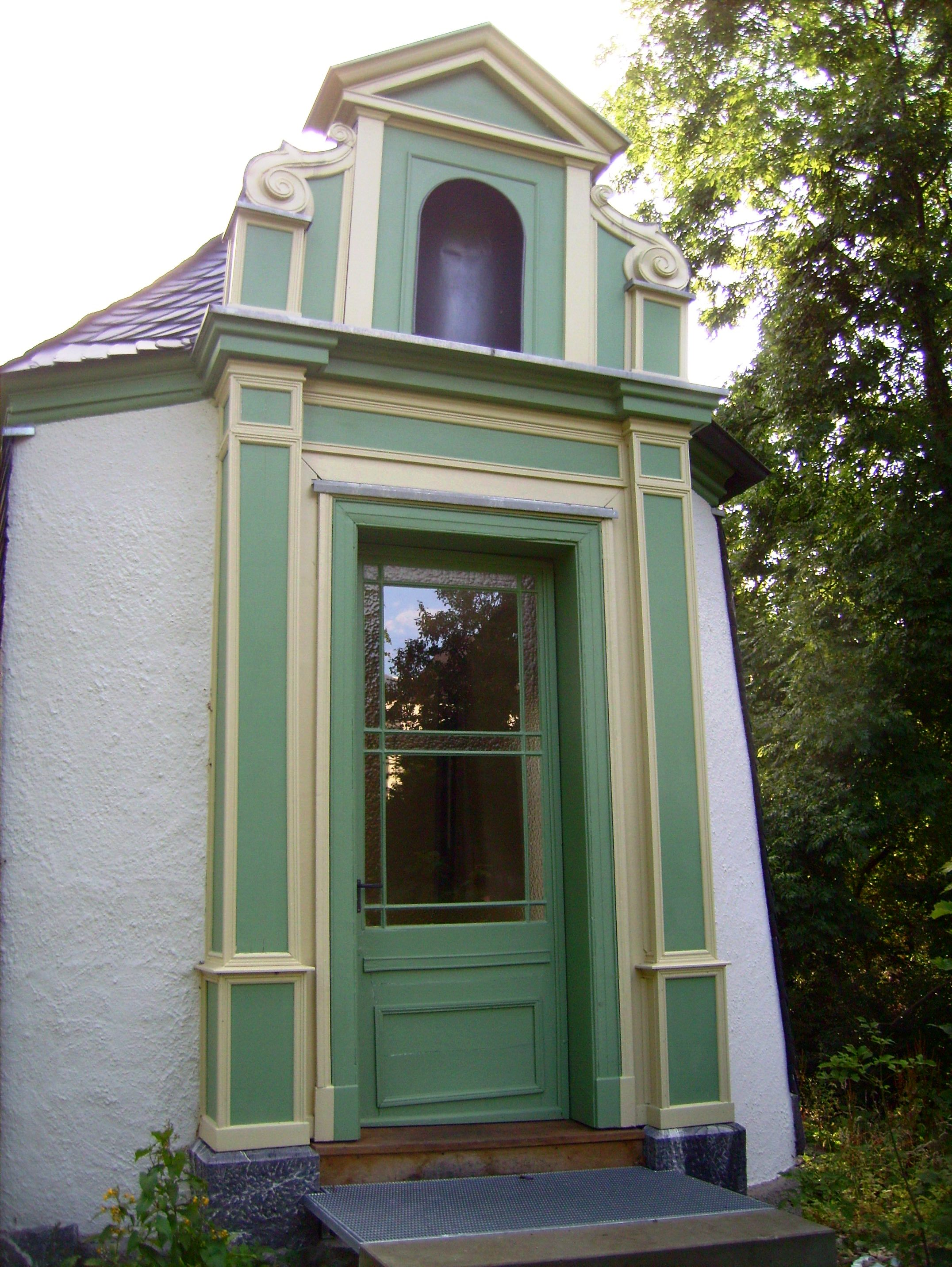 Klassizistisches Gartenhäuschen Arnsberg